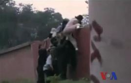 中国一再发生北韩脱北者闯外国驻华机构